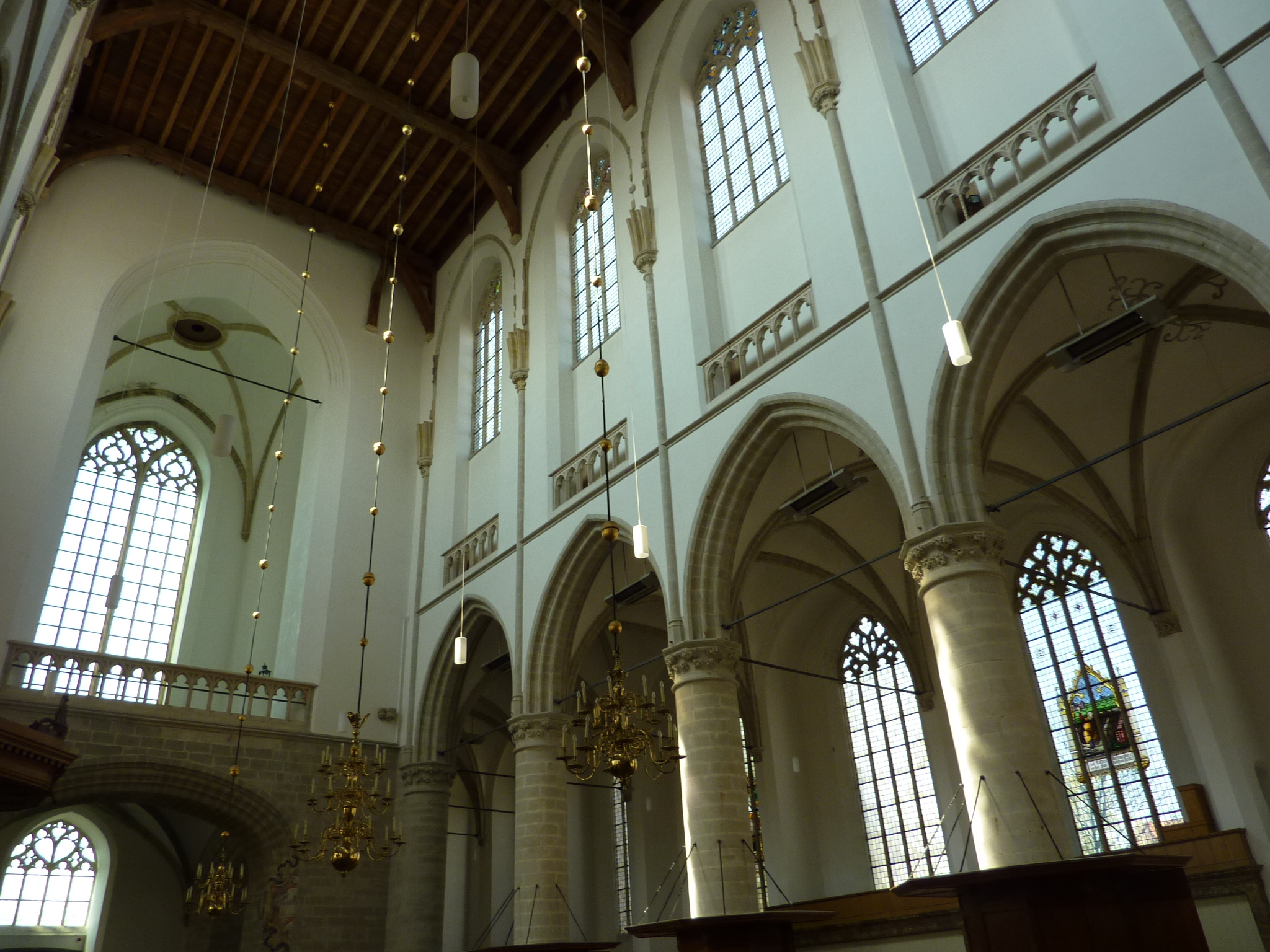 Catharijnekerk Brielle